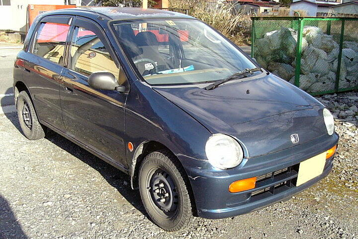 2代目ホンダ・トゥデイ（前期型）